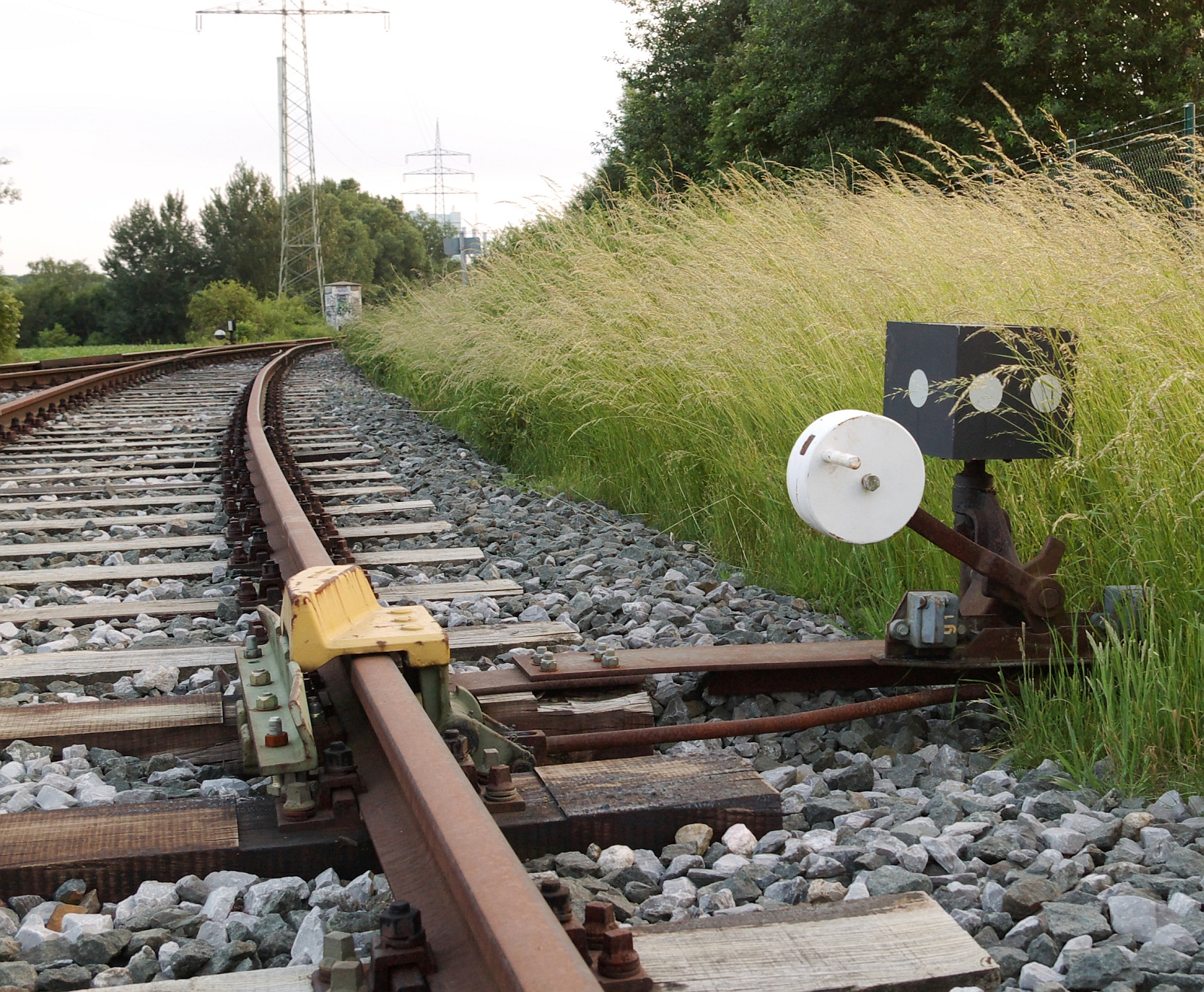 Gleissperre am Umspannwerk des Gersteinwerks in Hamm. Das Gleissperrensignal ist verkehrtherum eingebaut, aus der Zulaufrichtung müsste die Vorderseite des Sh 0/Gsp 0 sichtbar sein.